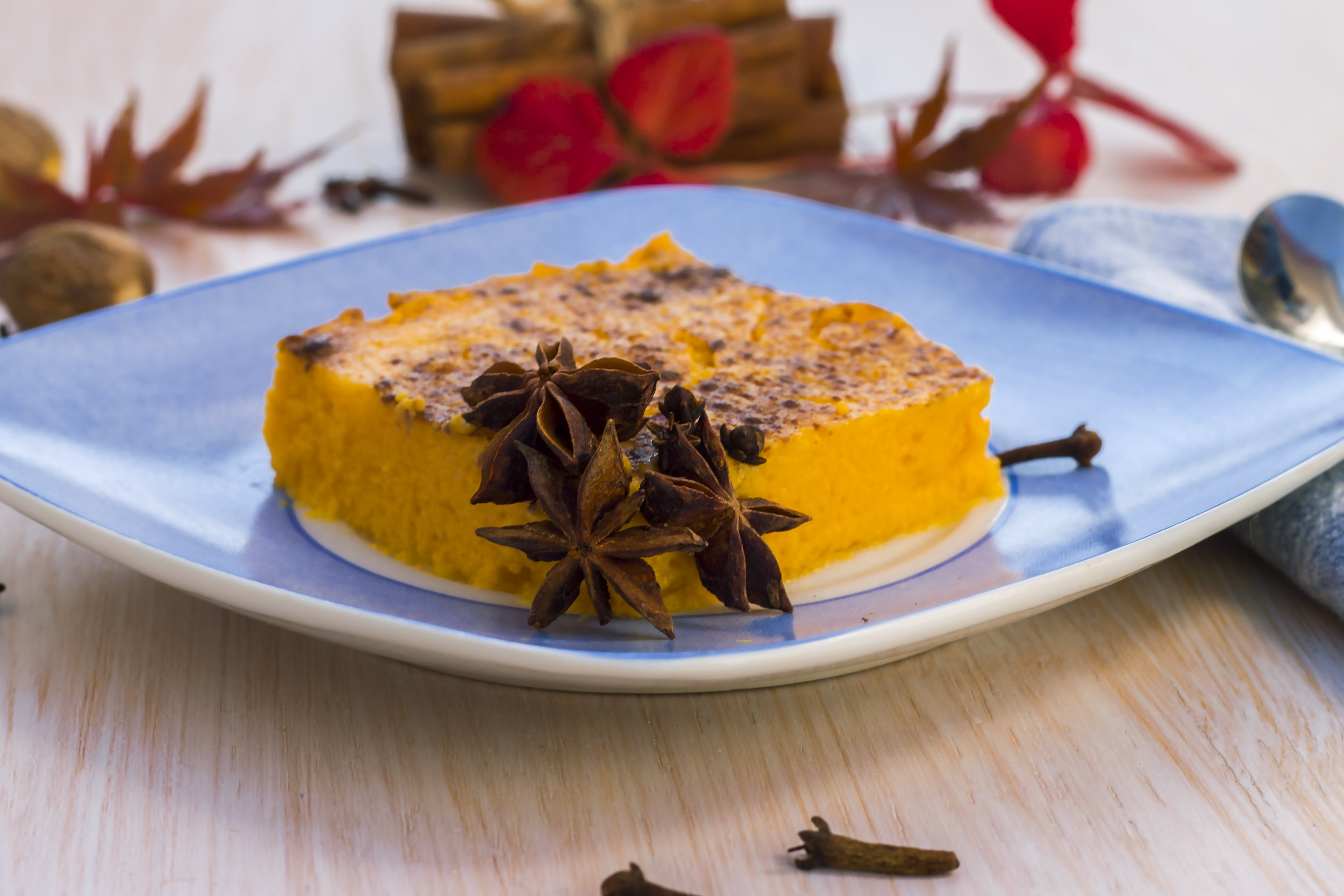 Едноставен за правење, тикварникот е еден од омилените традиционални есенски десерти во Прилеп. Со зачини како цимет или какао, е совршена закуска во постудените денови.